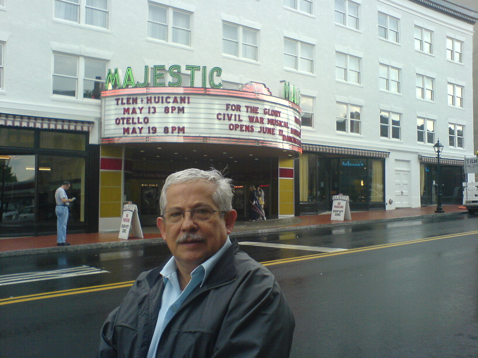 Alberto de la Rosa posando bajo un anuncio de el grupo Tlen-Huicani en el Majestic Theatre en Gettysburg.